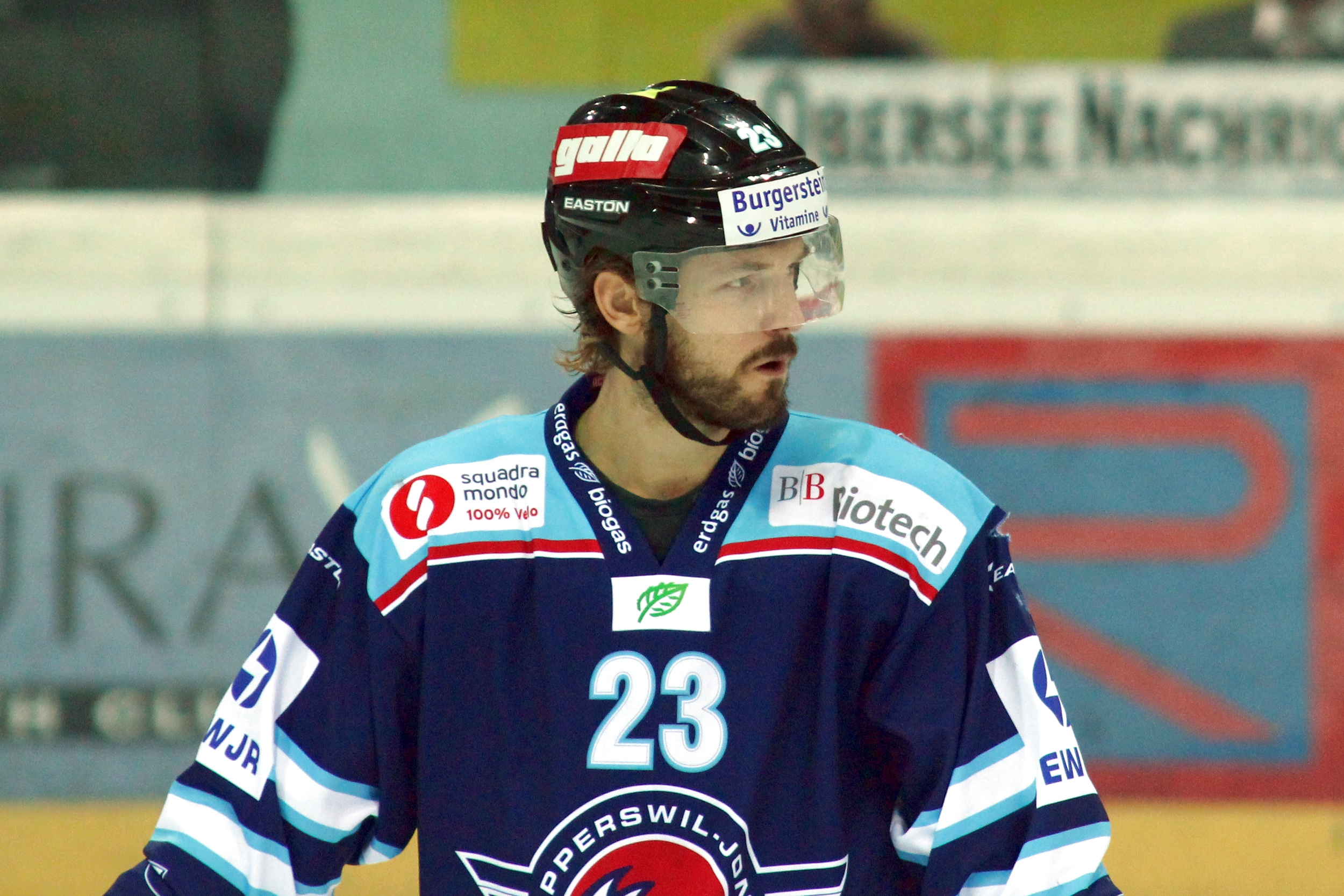 Niklas Persson (RJ 23).